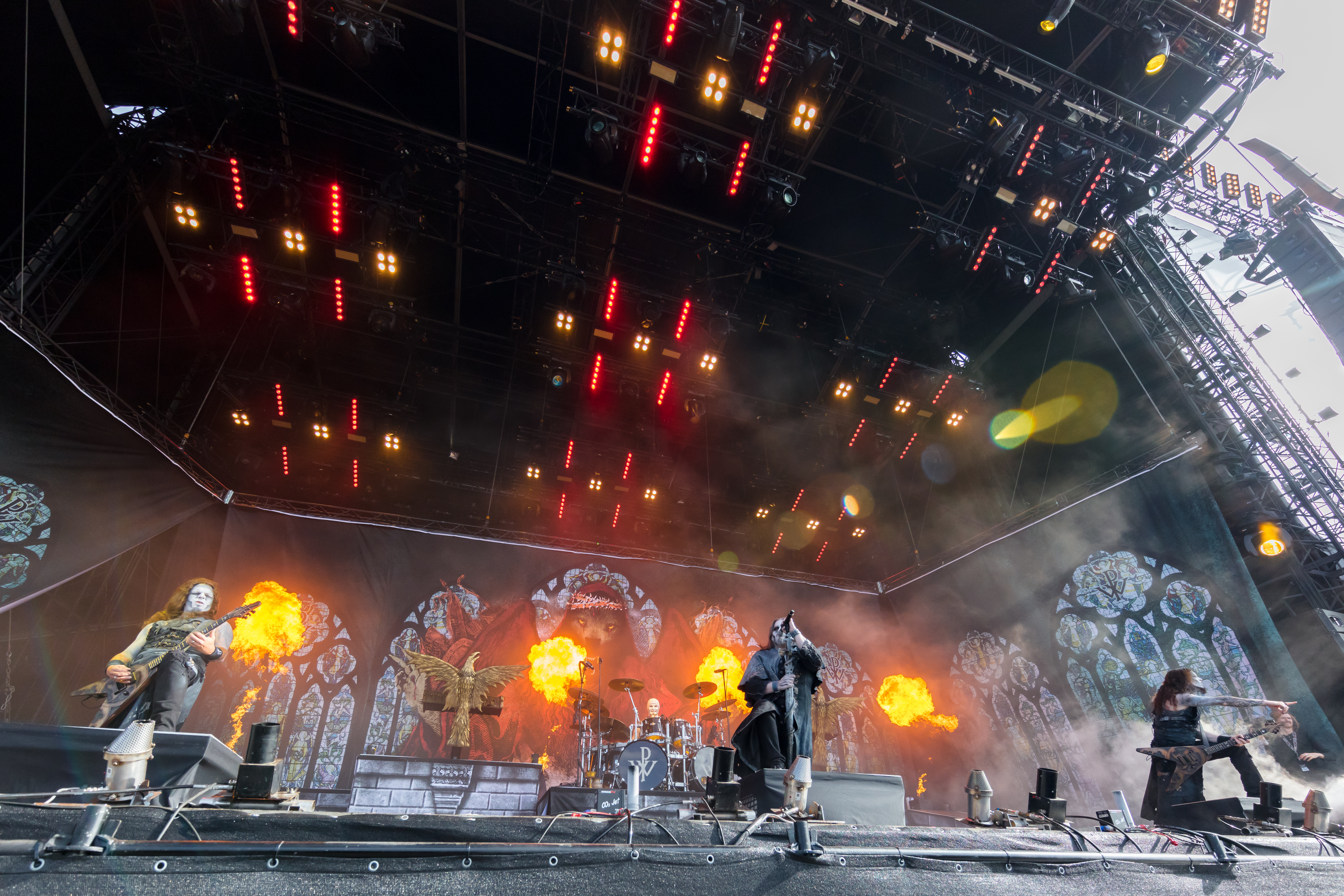 Powerwolf during Wacken Open Air at Schleswig-Holstein, Wacken, , Germany on 2017-08-05, Photo: Sven Mandel